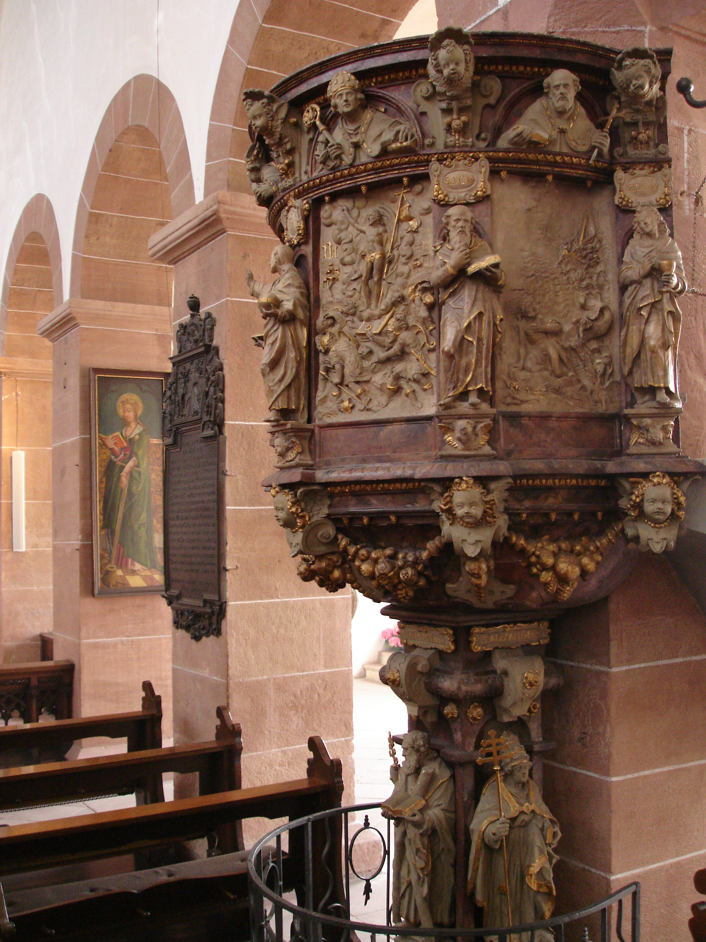 Johannes (Hans) Juncker Kanzel der Stiftskirche Aschaffenburg um 1602 Sandstein-Marmor-Alabaster, Kanzelfuß: Kirchenpatrone Petrus und Alexander und Apostel Andreas, Kanzelkorb: Bildtafeln (bibl.Szenen) Figuren (christus und die vier Evangelisten, im Abschlußfries die vier Kirchenväter als Halbfiguren.